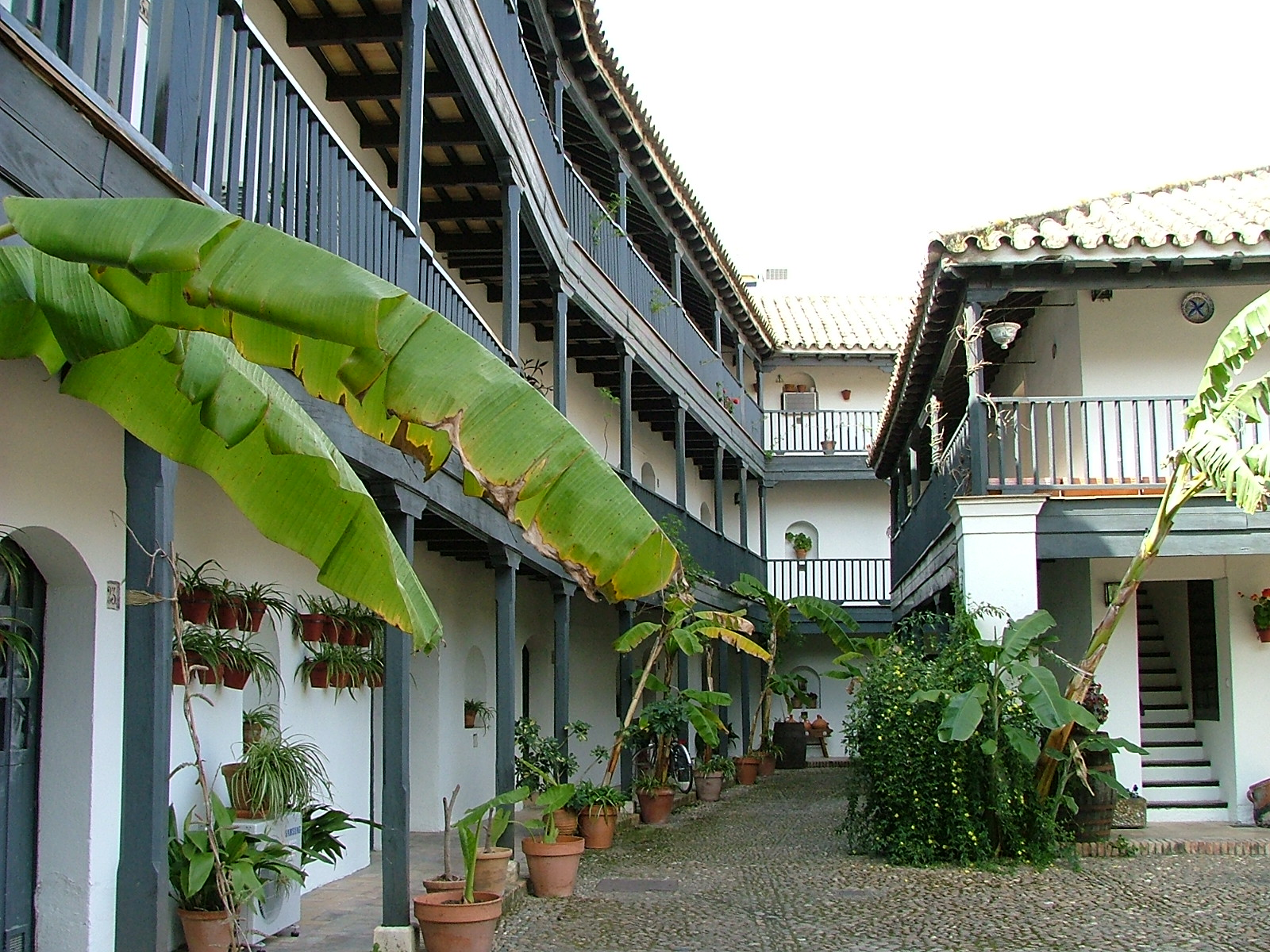 Corral del Conde, Sevilla. Siglo XVIII, aunque de origen musulmán. Denominado así por haber pertenecido al Conde Duque de Olivares.